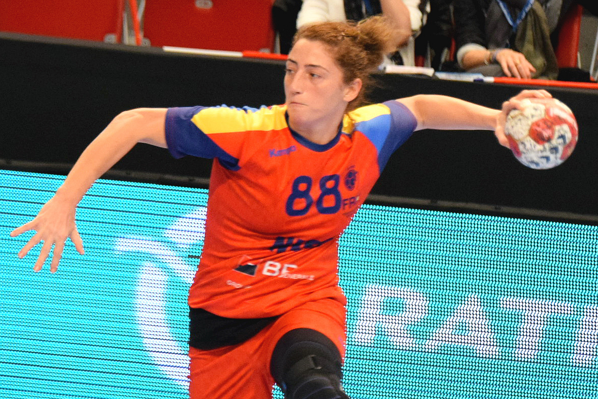 Patricia Vizitiu Le 29 novembre 2015, lors du match Roumanie / Cuba pour le compte du TIPIFF 2015. Au stade Pierre de Coubertin à Paris.